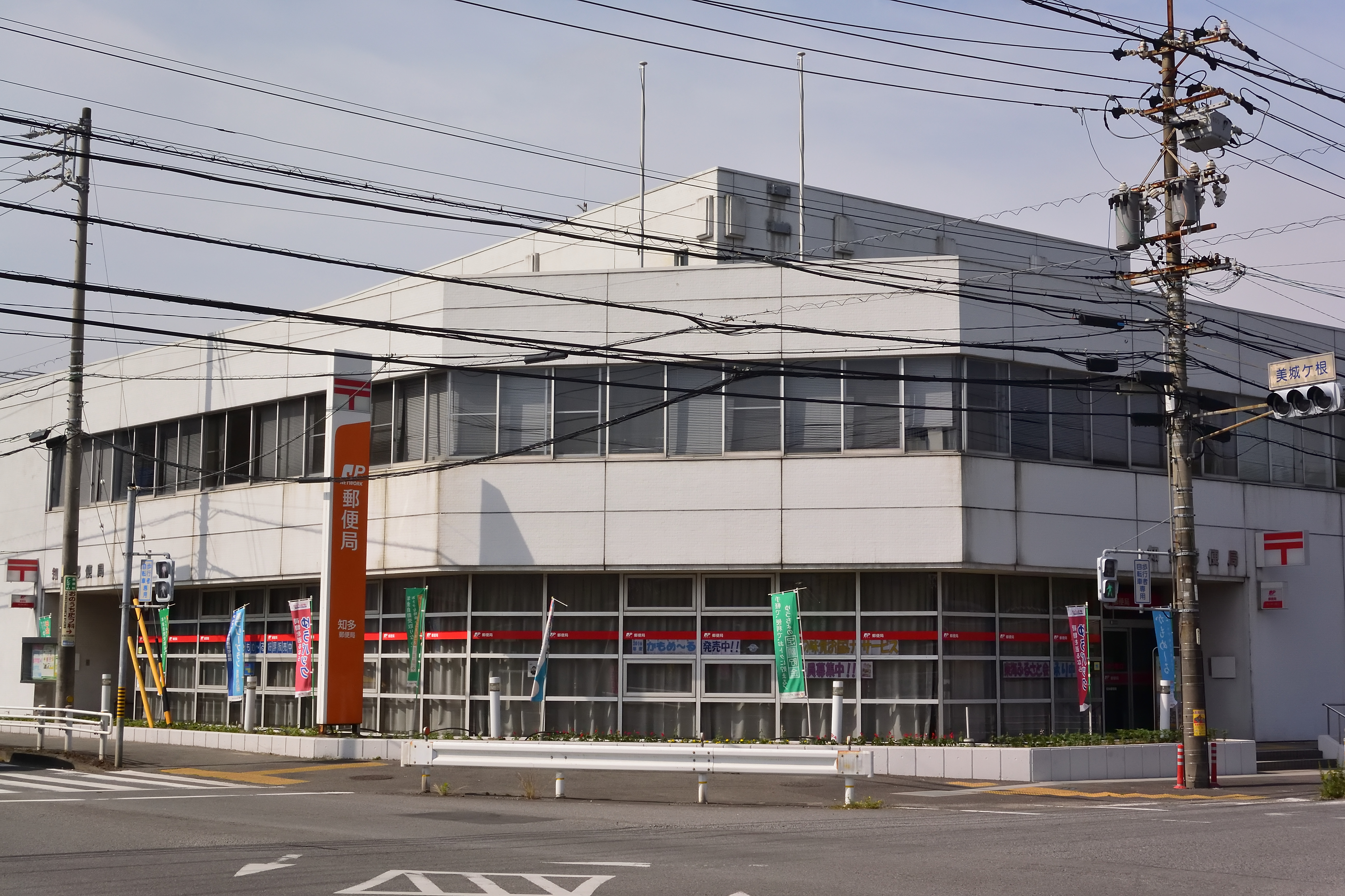 知多郵便局外観